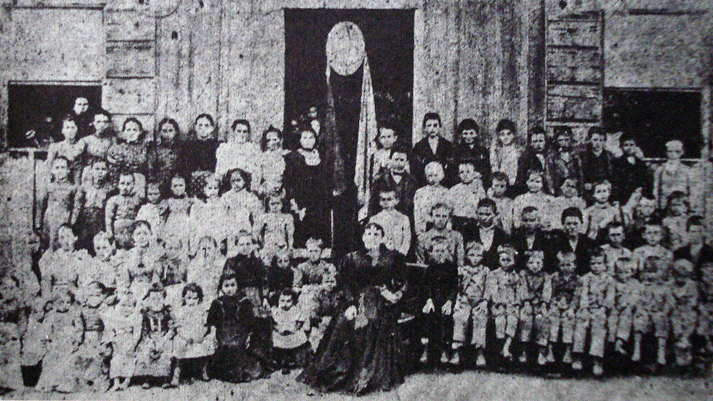 Luiza Marchioro, a Maestra, famosa professora de Caxias do Sul no século XIX, e seus alunos em frente de sua escola.